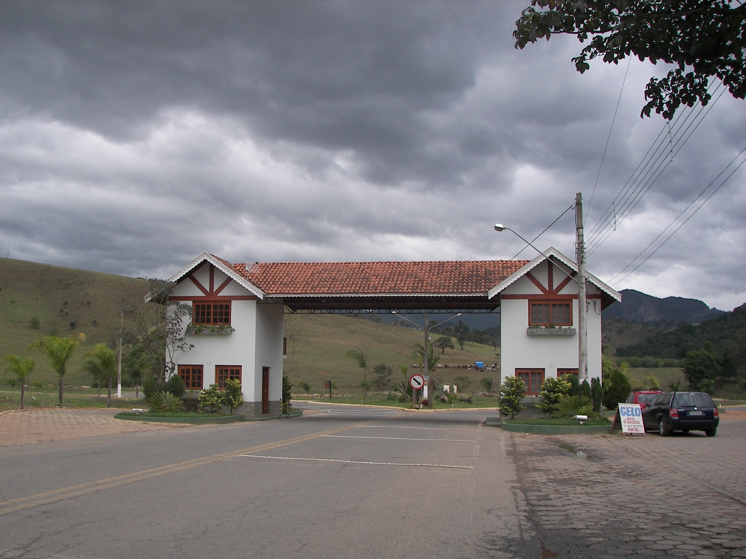 Portal de entrada da cidade de São Bento do Sapucaí, SP, Brasil.